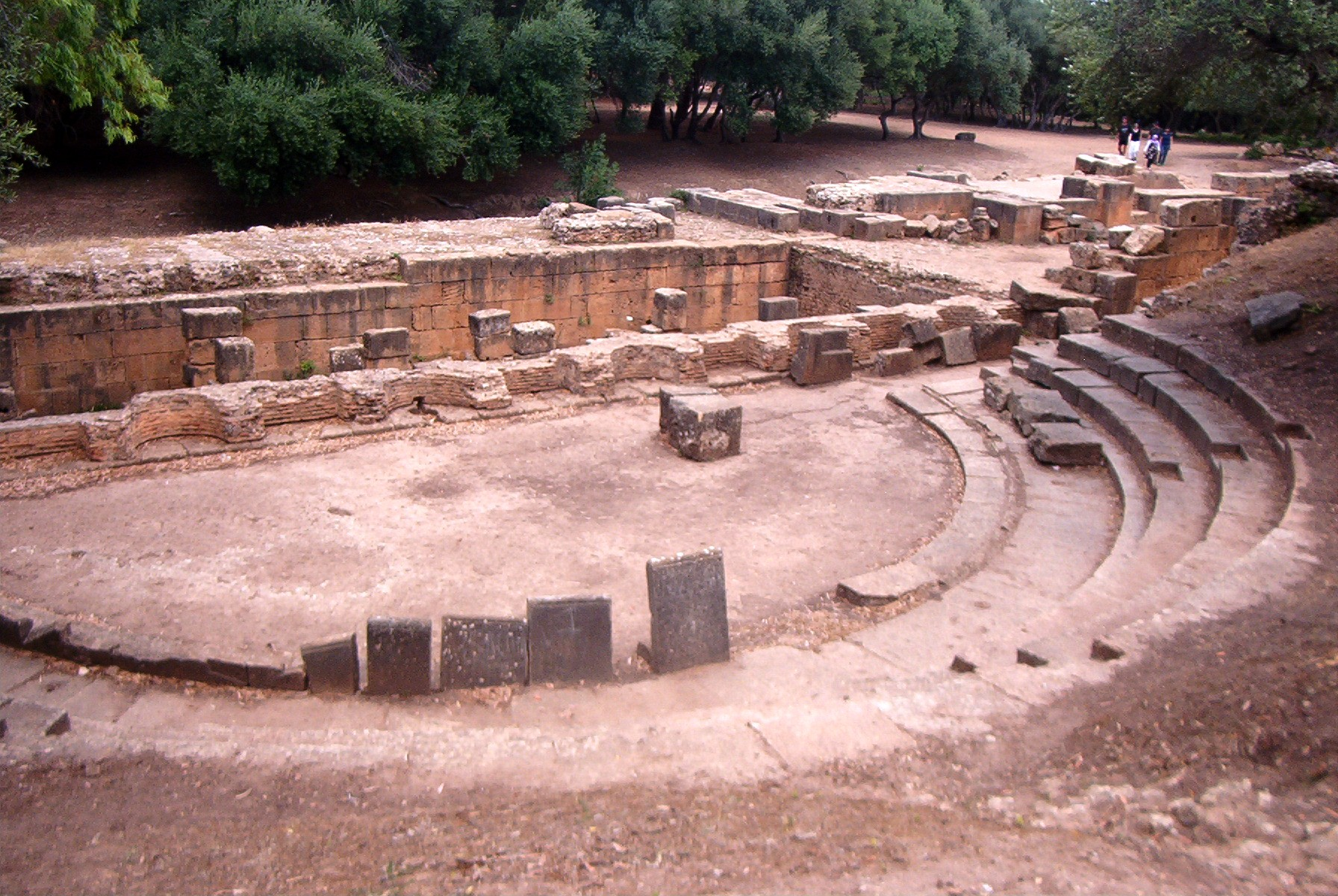 Le théâtre